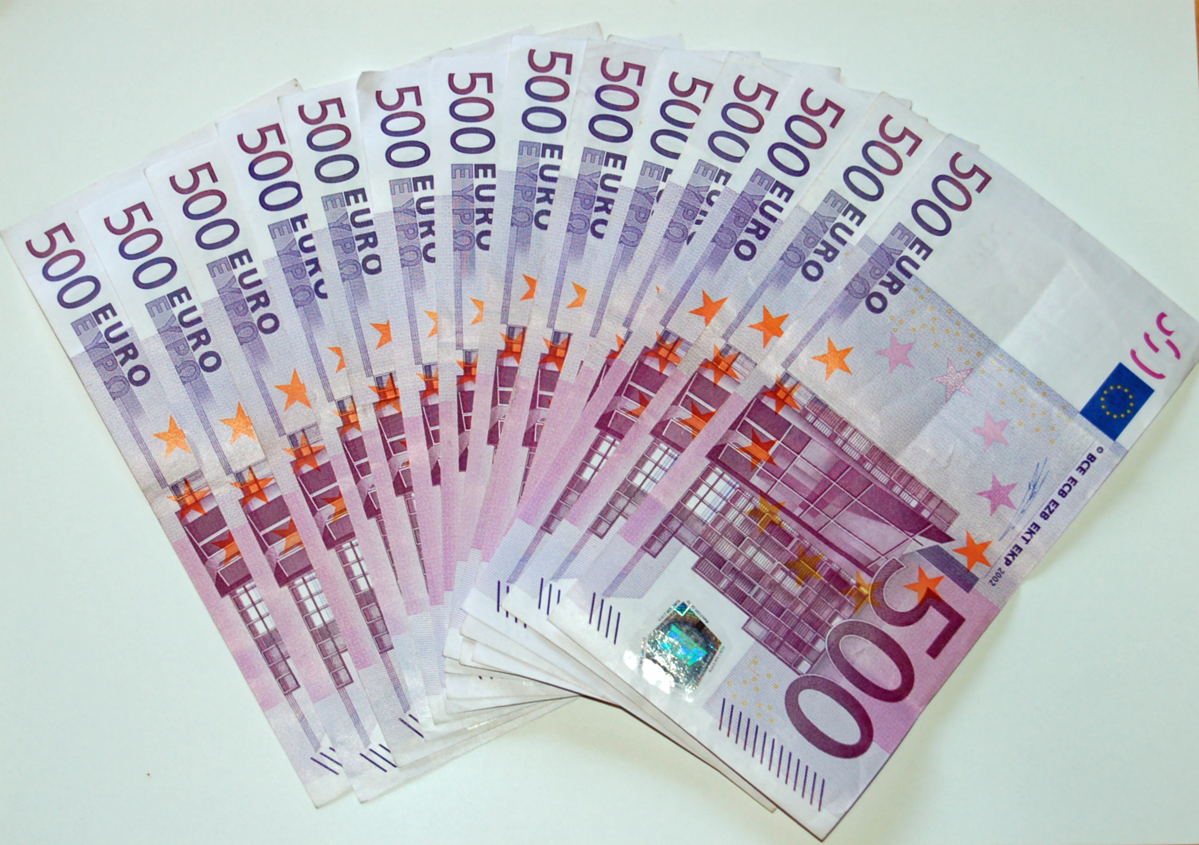 14 500 Euro-Scheine auf einem Din A 4 Blatt